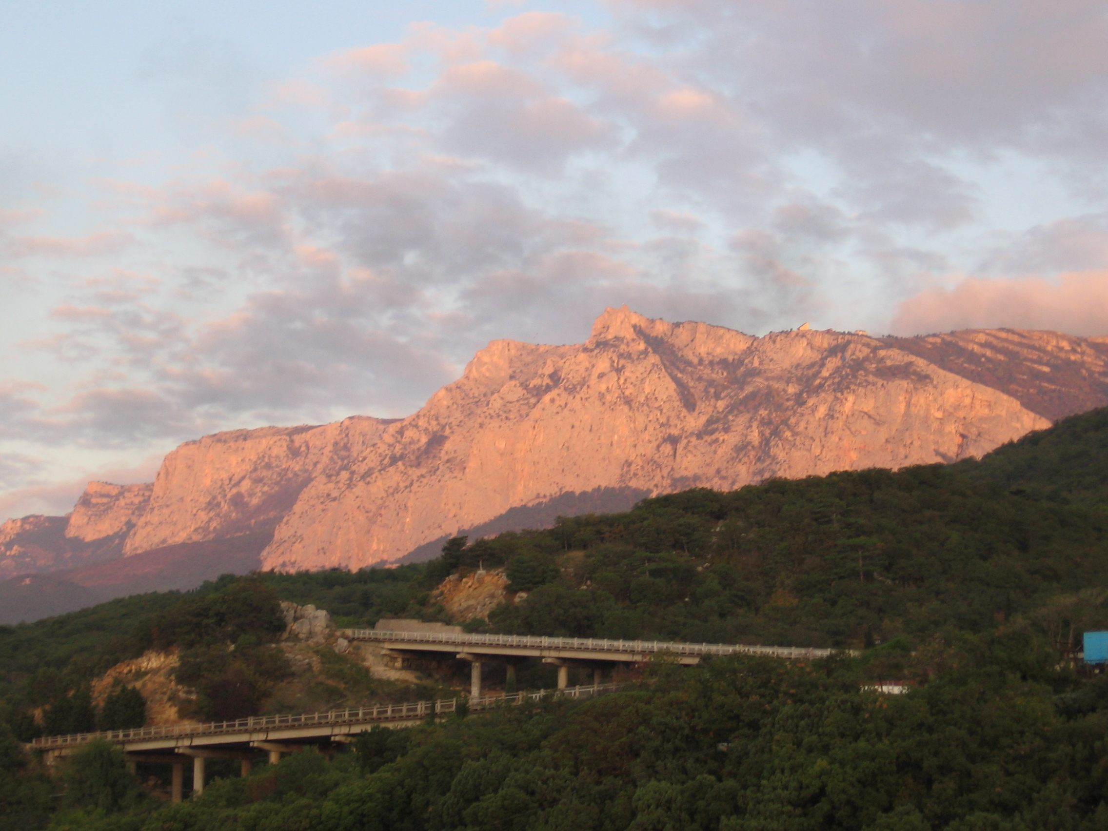 Фото